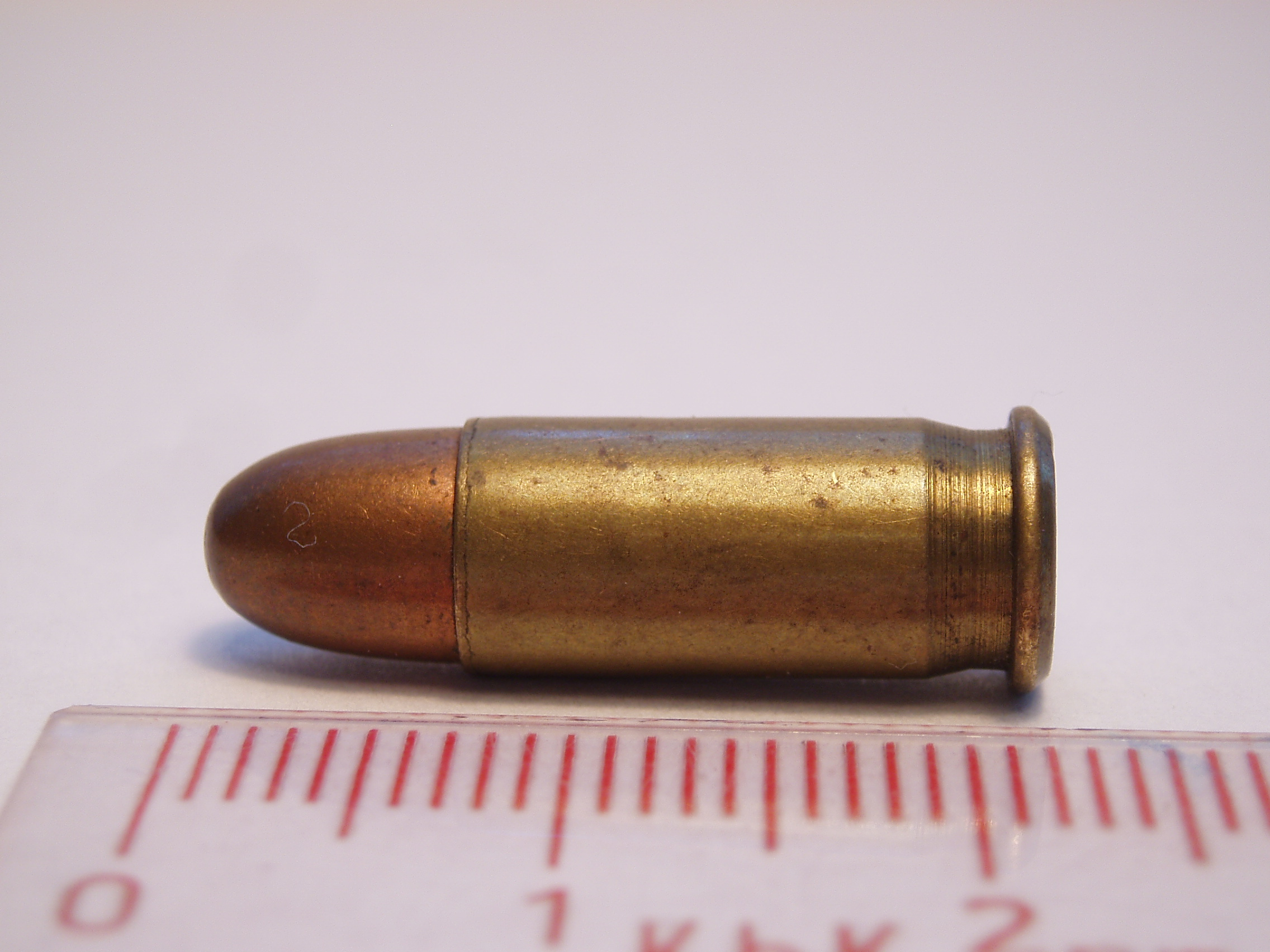 .25 ACP pistol cartrdige. FMJ bullet. Manufacturer: Sellier & Bellot.